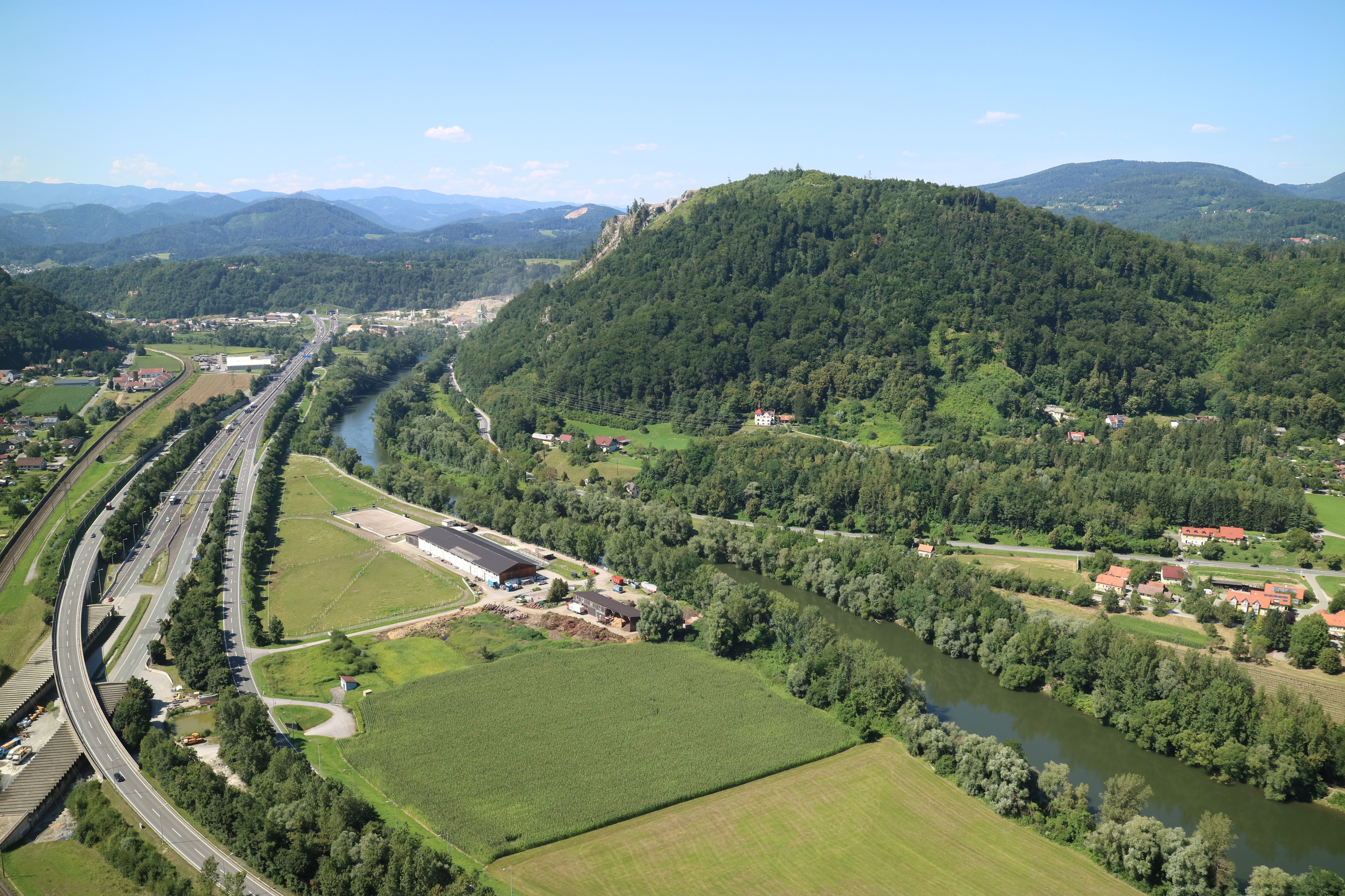 Blick vom Jungfernsprung bei der Ruine Gösting über das Murtal zum Kanzelkogel